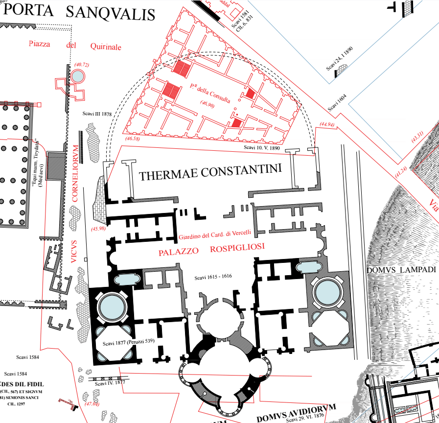 Mappa delle Terme di Costantino dalla Forma Urbis Romae